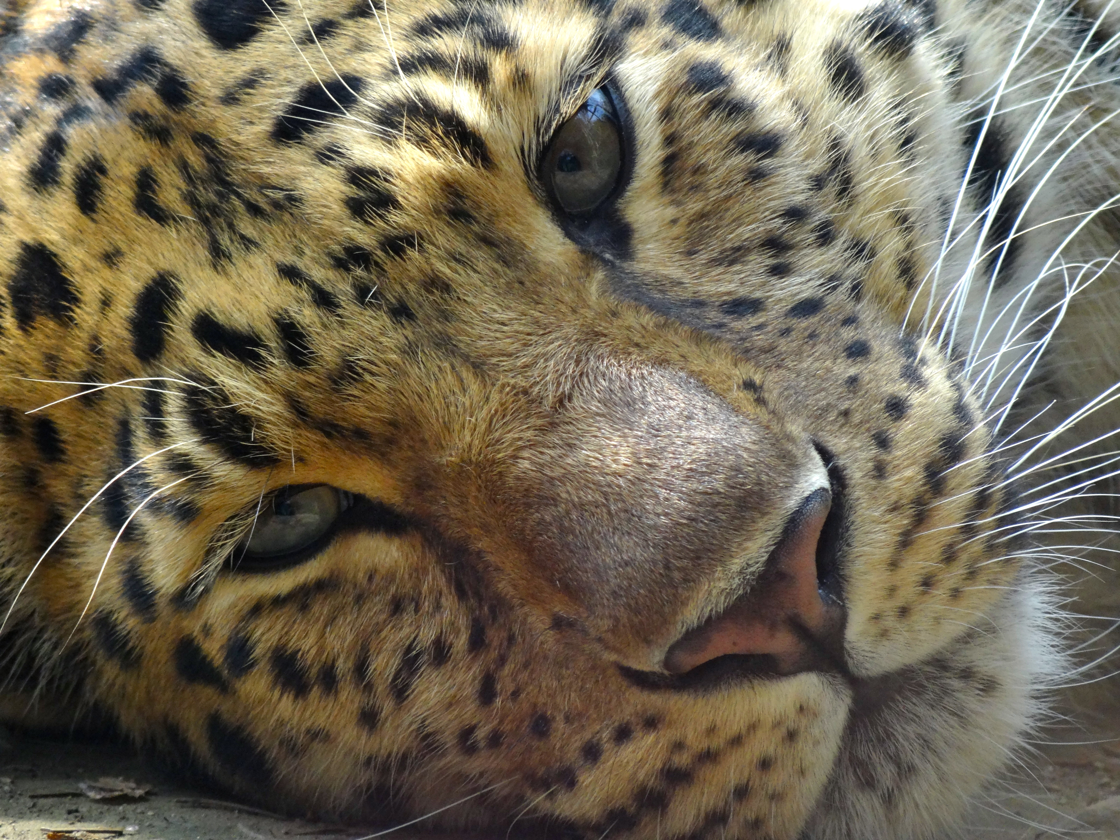 Esemplare di leopardo dell'Amur (Panthera pardus orientalis), al Parco Faunistico "La Torbiera" - Agrate Conturbia (NO)